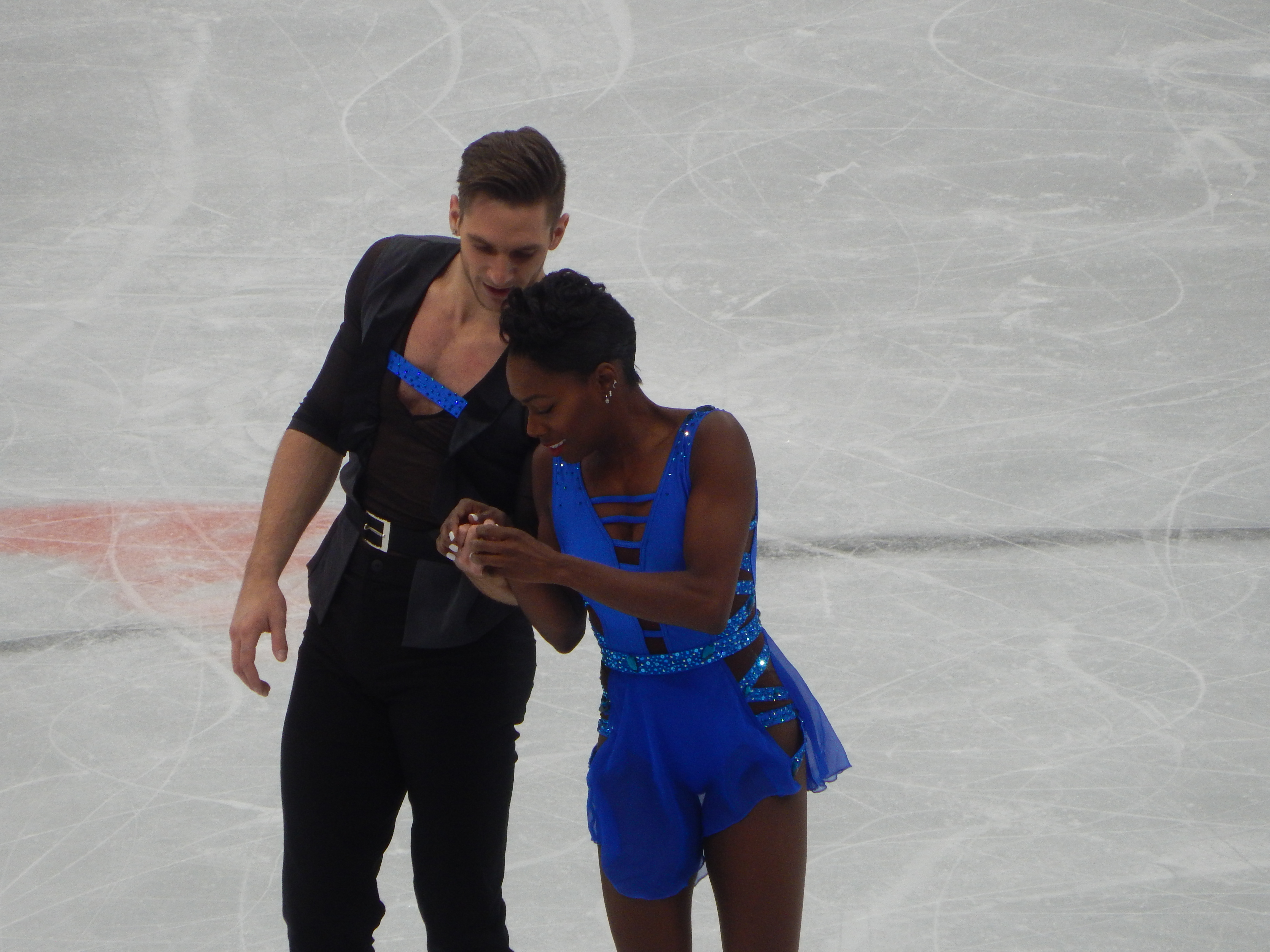 Чемпионат Европы по фигурному катанию 2018 в Москве. Первый день соревнований (17 января). Победители в короткой программе французская пара Ванесса Джеймс и Морган Сипре